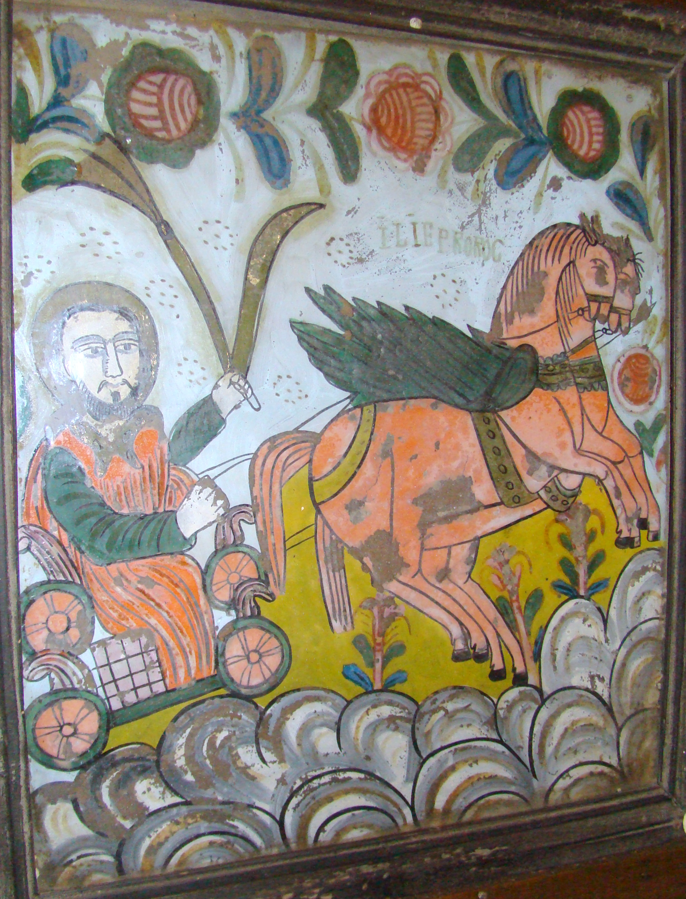 Biserica de lemn din Tinca, județul Bihor